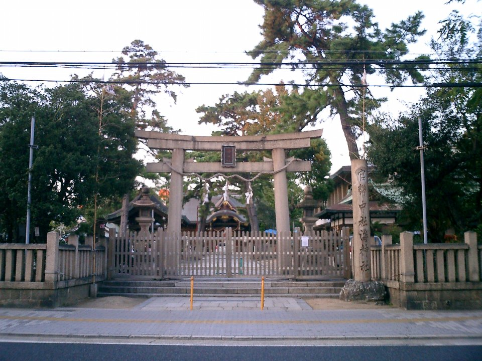 Watatsumi-Jinja